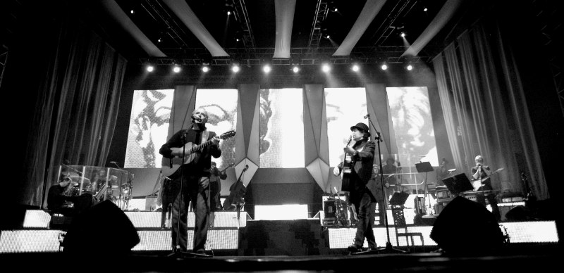 Dos Pájaros de un Tiro. Sabina y Serrat. Coliseo General Rumiñahui, Quito-Ecuador Sábado 17.11.07 20:40 Nikon D100 Nikor 15 mm Gran Angular V. 1/80 ISO 1600